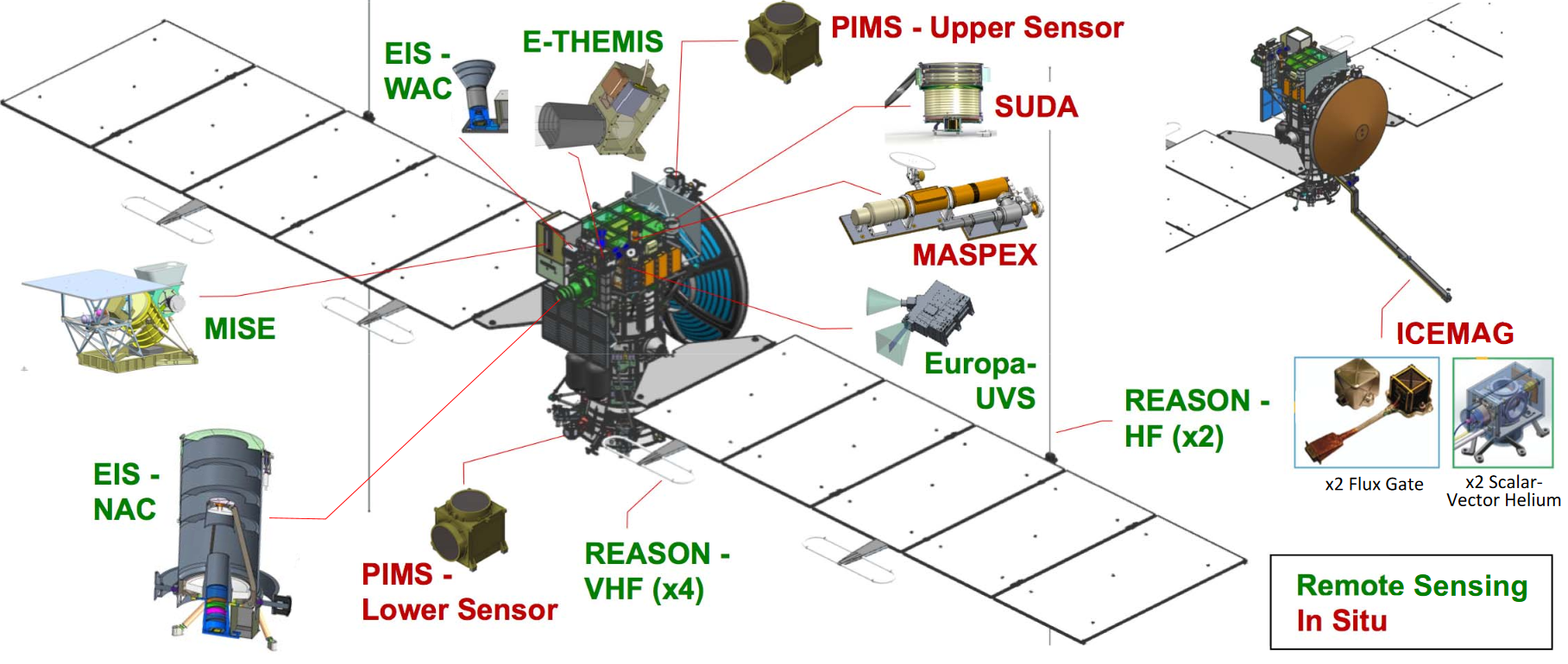 Europa Clipper diagram : Europa Clipper Science Instruments